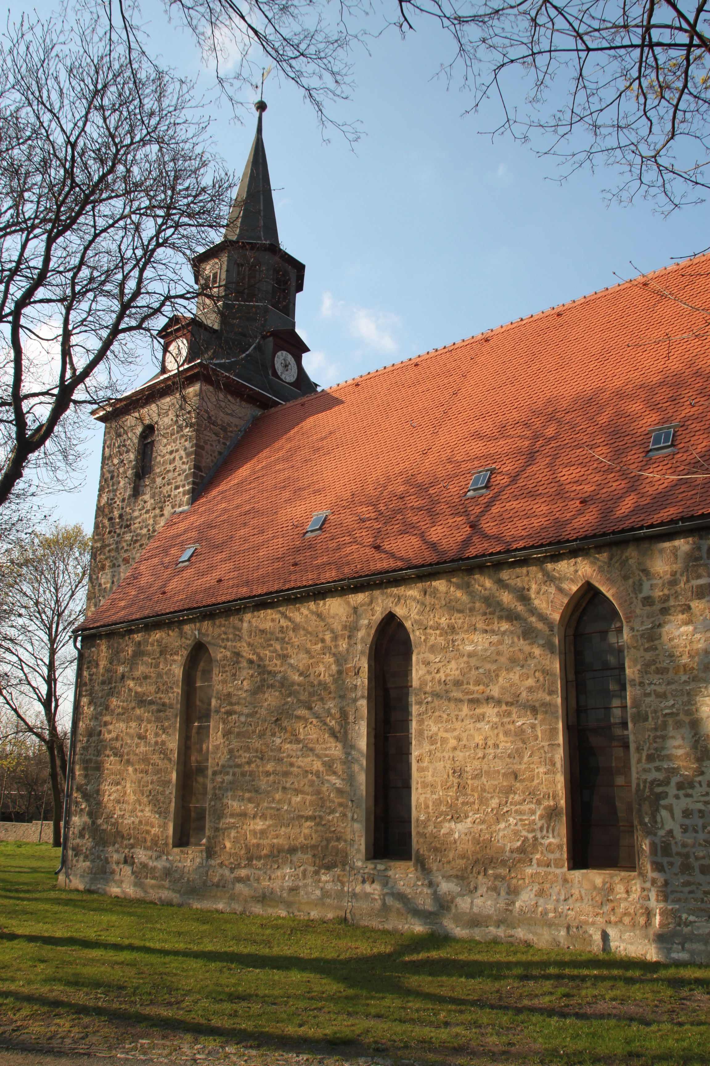 Seeland-Hoym, ev. Stadtkirche St. Johannis